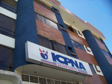 LOCAL ICPNA REGION CENTRO - AYACUCHO